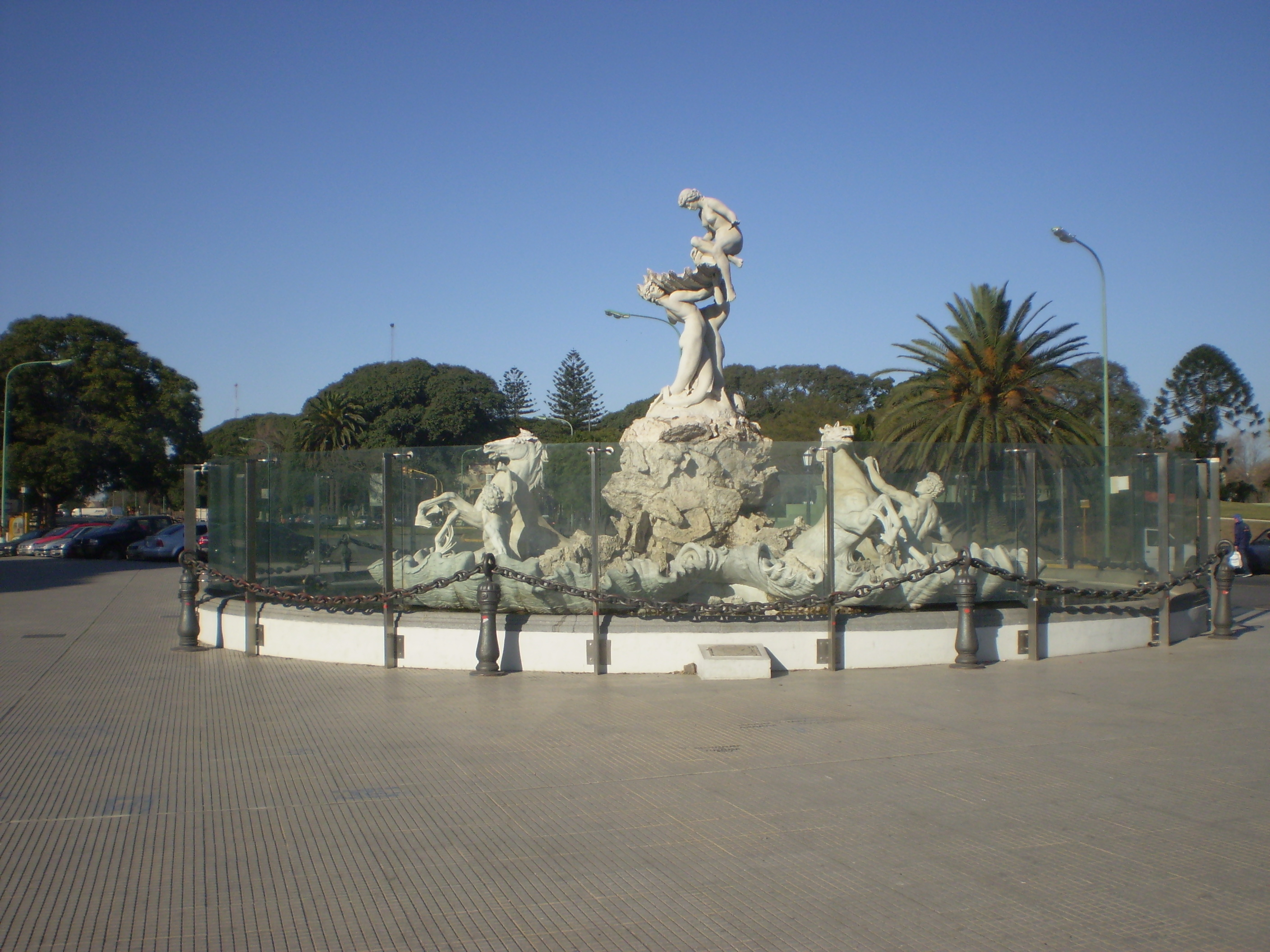 Fuente de las Nereidas (Lola Mora), Bienos Aires